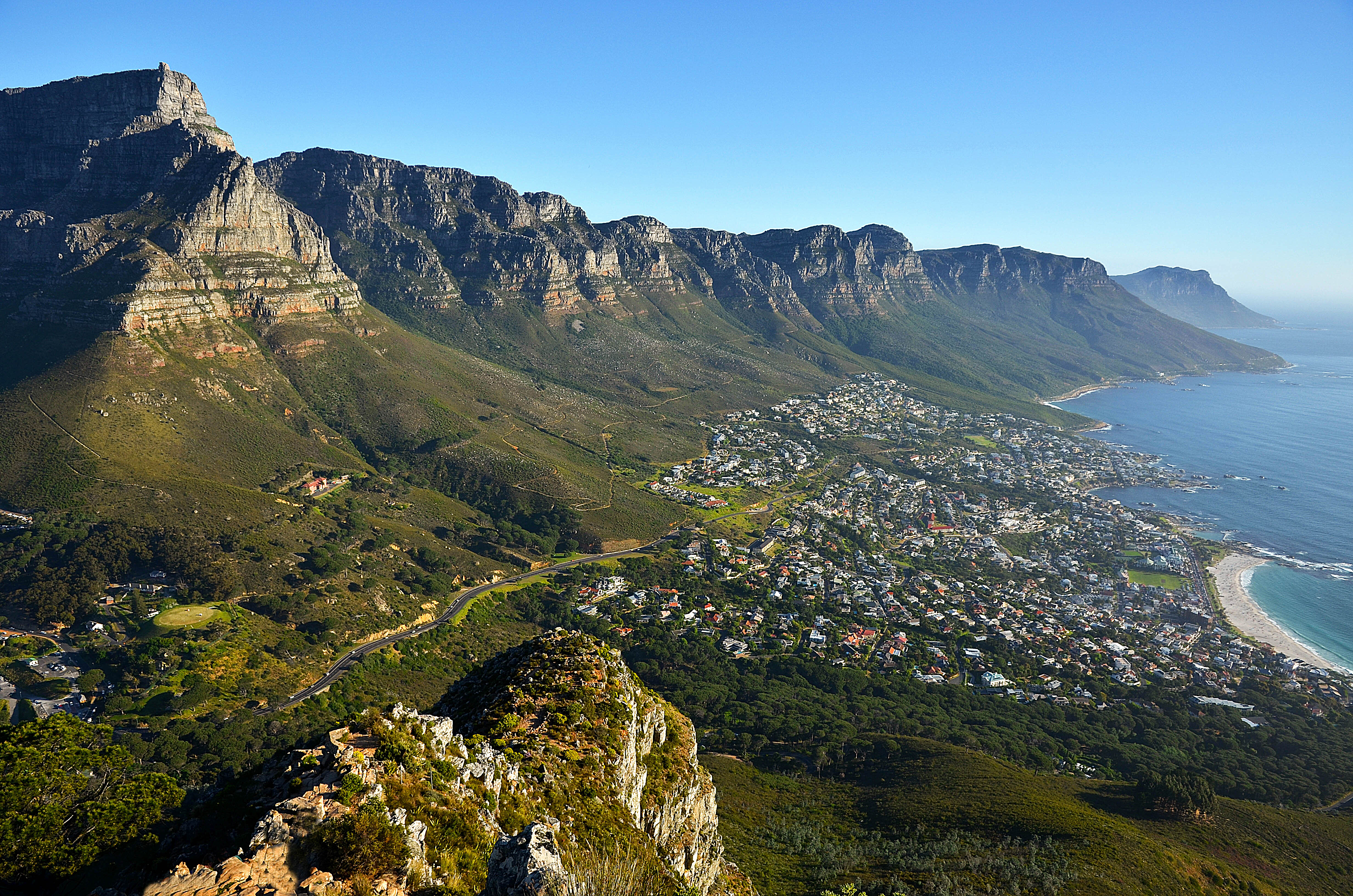 12 apoštolů, Kapské město - Twelve Apostles Cape Town